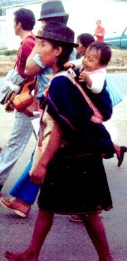 Fotografía de "pnhî'h": una madre nasa con su hijo, tomada por mí durante una manifestación de protesta en Popayán en 1984.